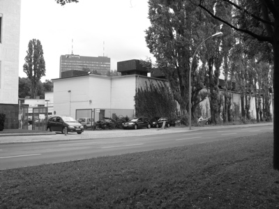 Bunker der Reichsbahn in Berlin-Kreuzberg am Halleschen Ufer